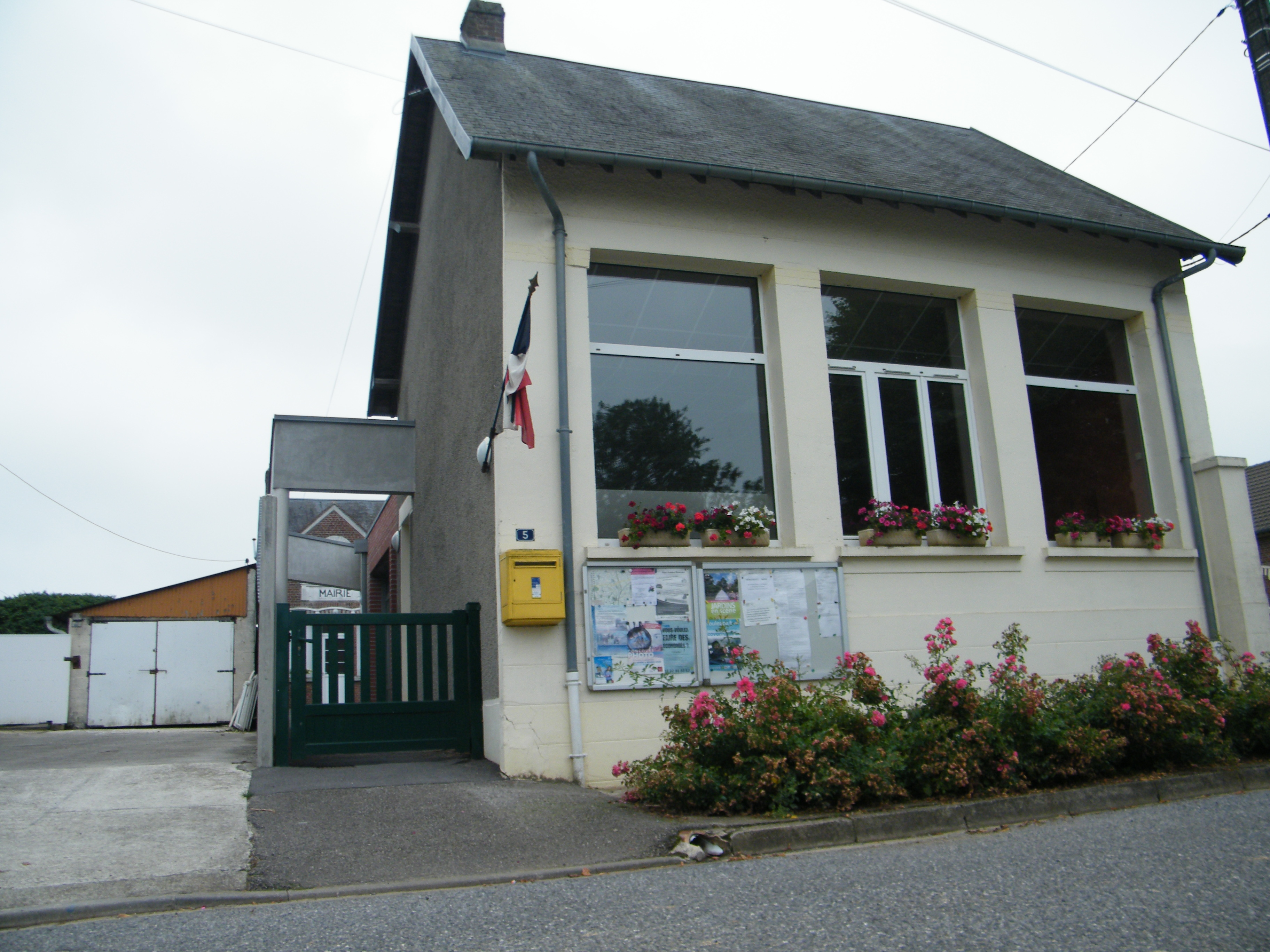 La mairie de Ginchy, Somme, France.